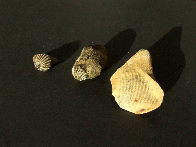 Fossiles des plateaux calcaires de la Puisaye et de la Forterre (Étais-la-Sauvin, dép. Yonne).